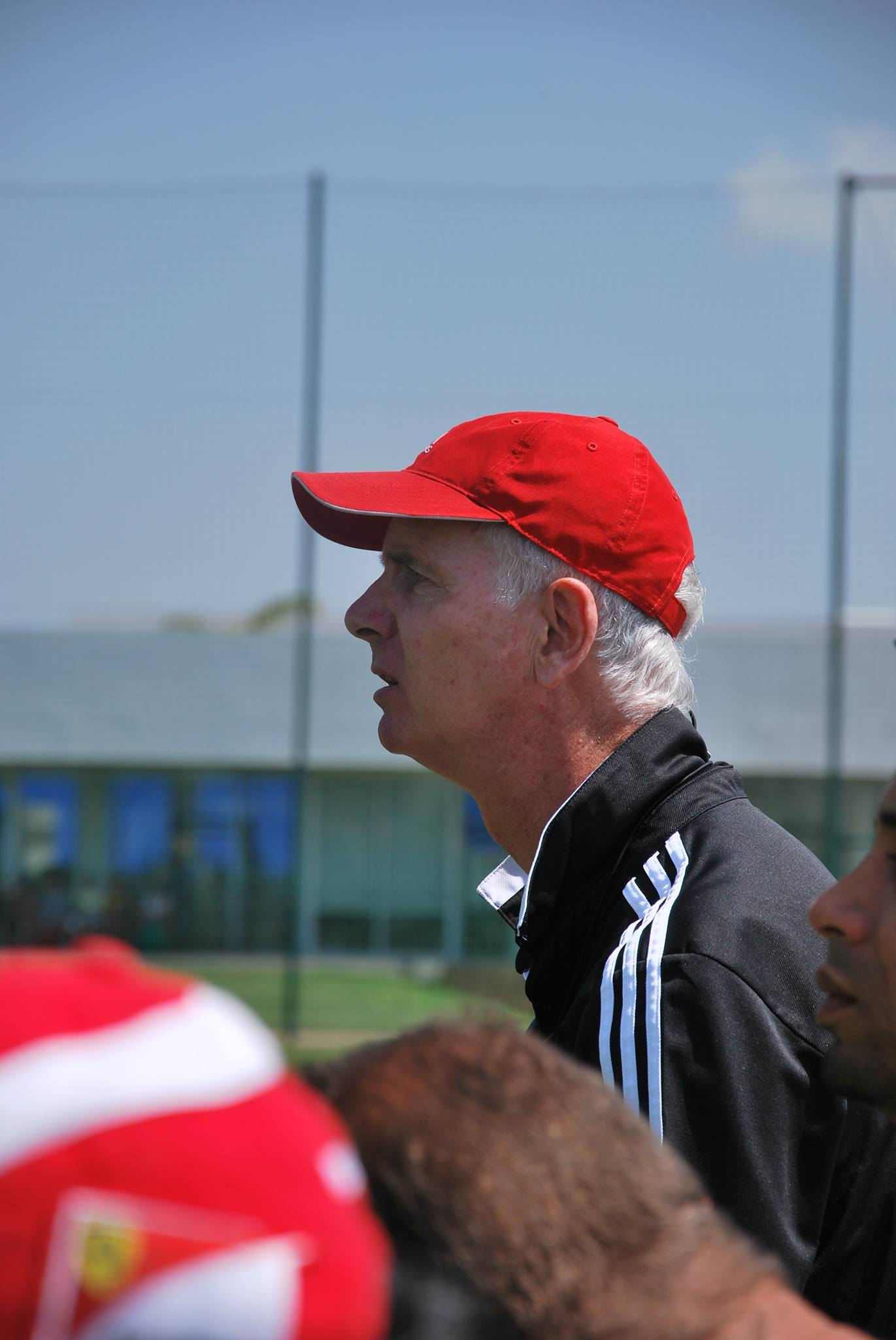 Pascal Théault, mai 2014